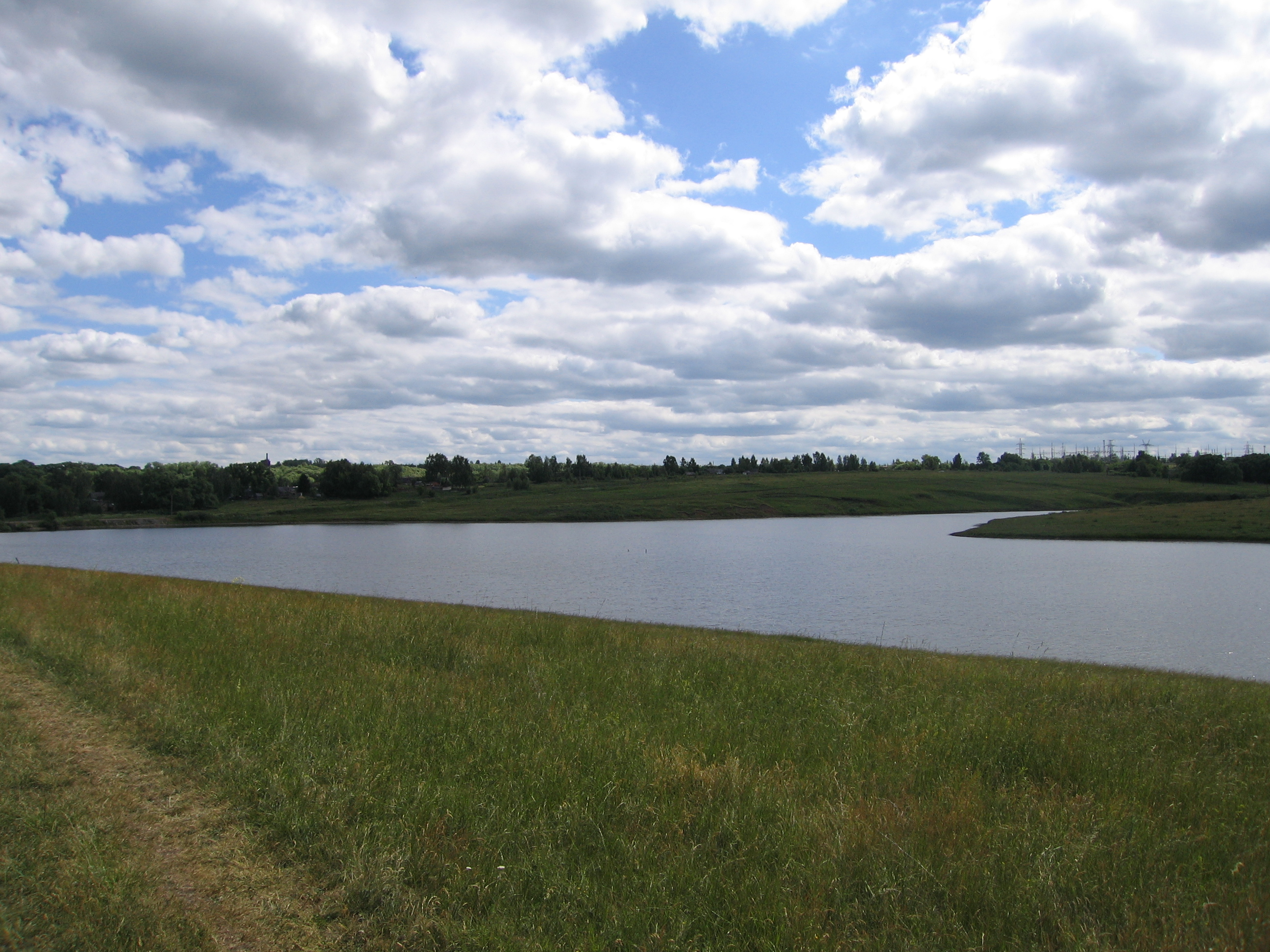 Пруд в Бегичевском посёлке.